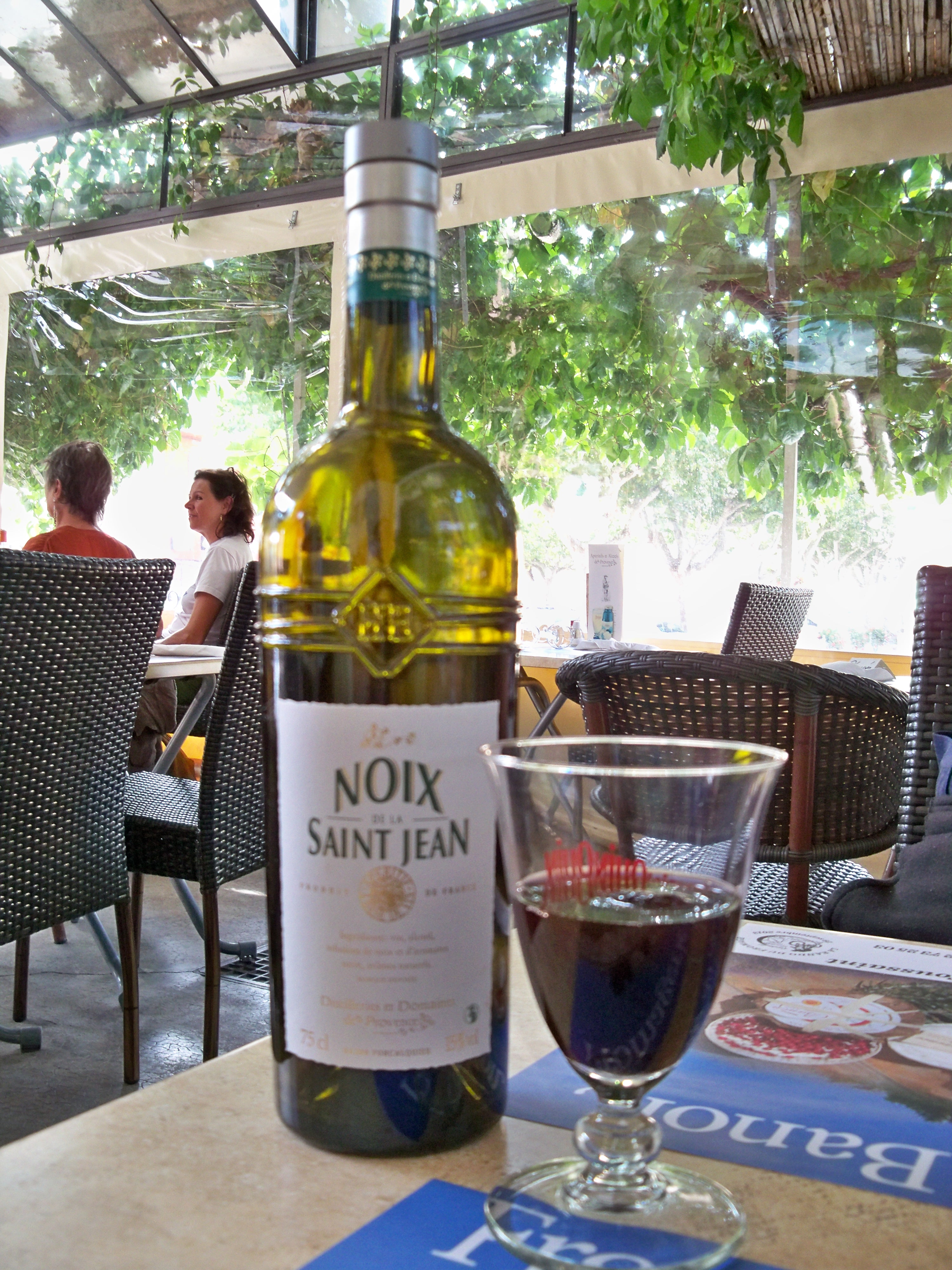 vin de noix au Bistrot de pays d'Oppède